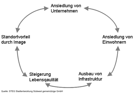 Kreislauf Standortattraktivitaet